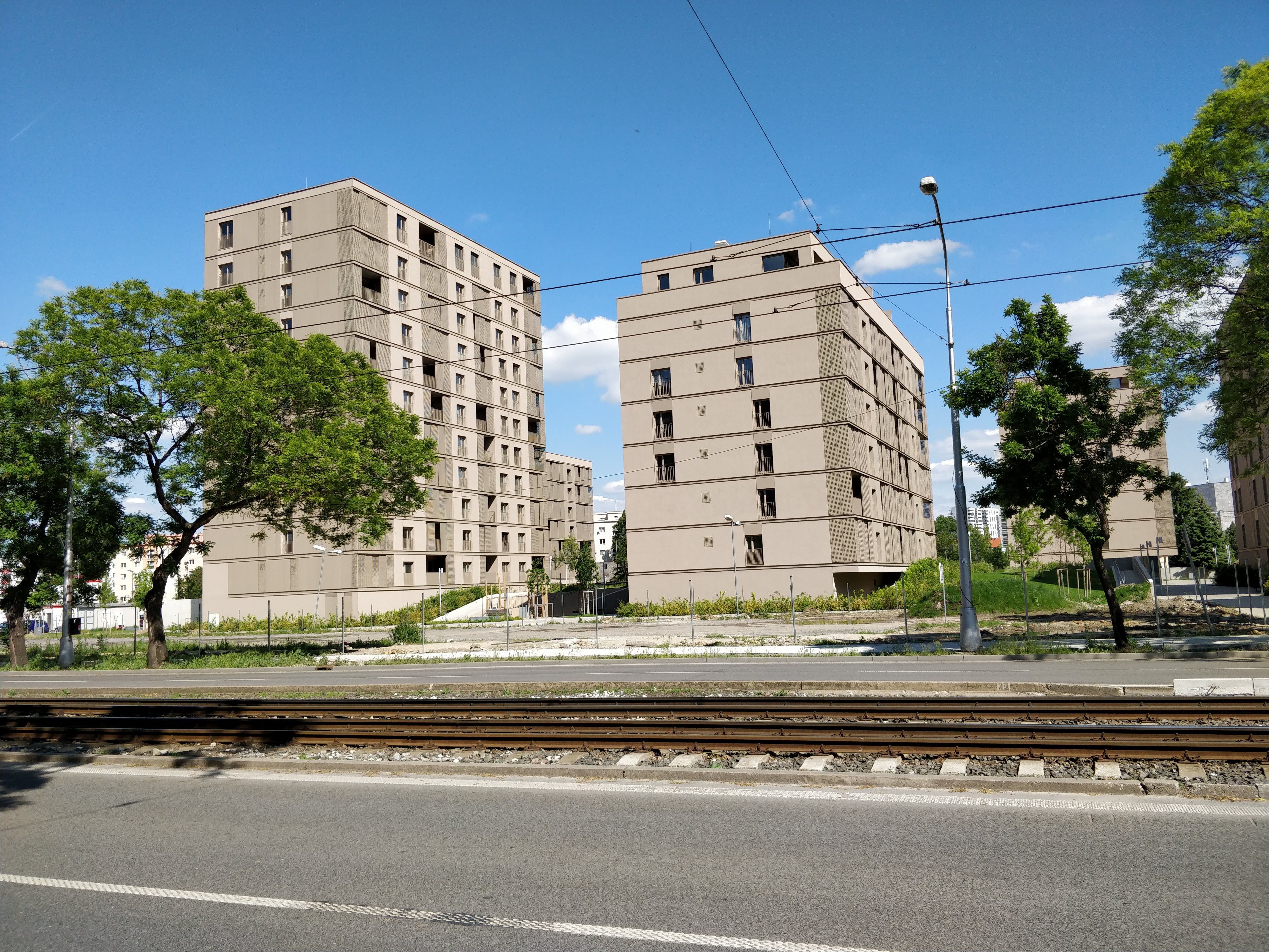 Pri Mýte